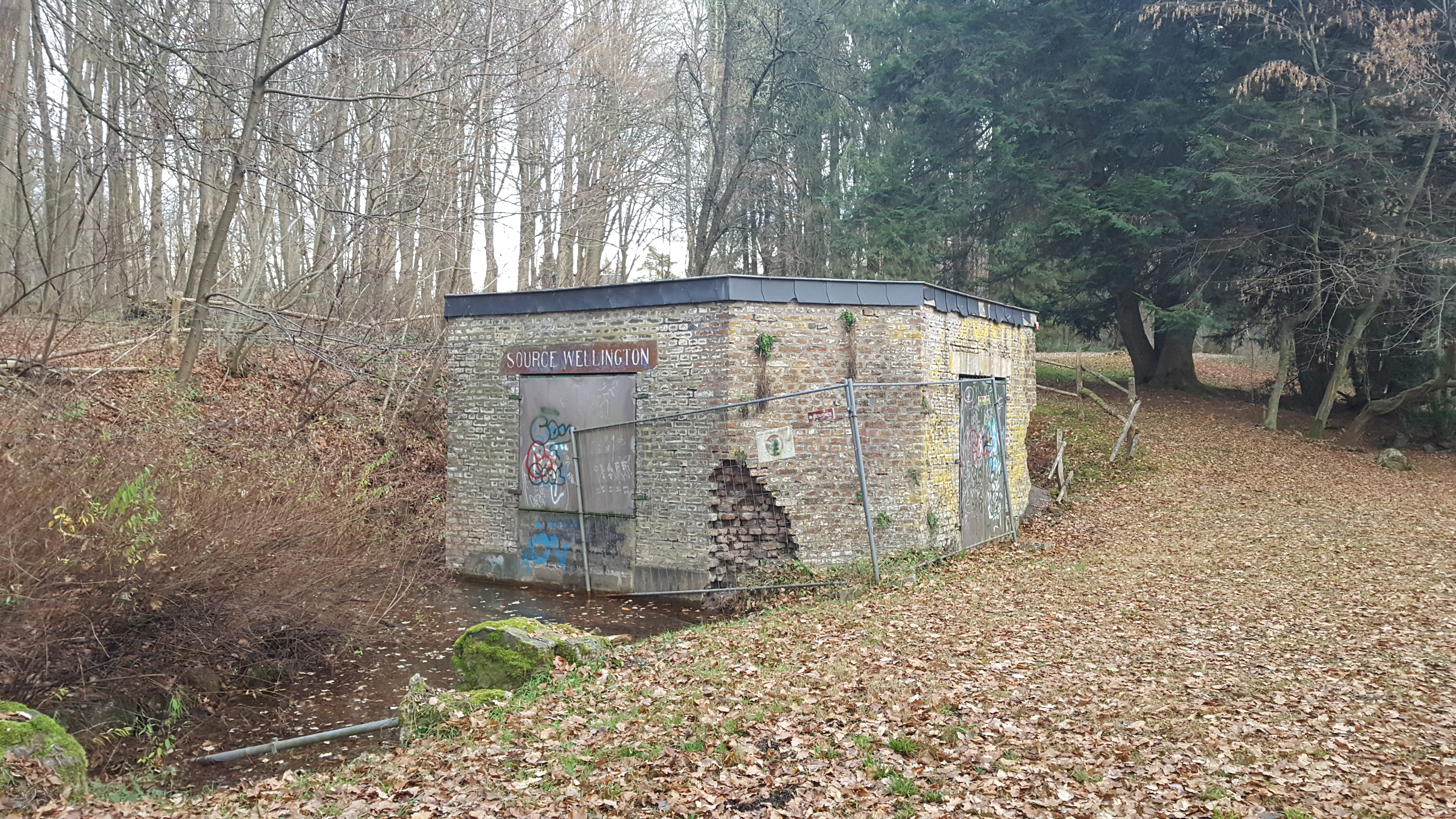 Source Wellington, Spa, Belgique